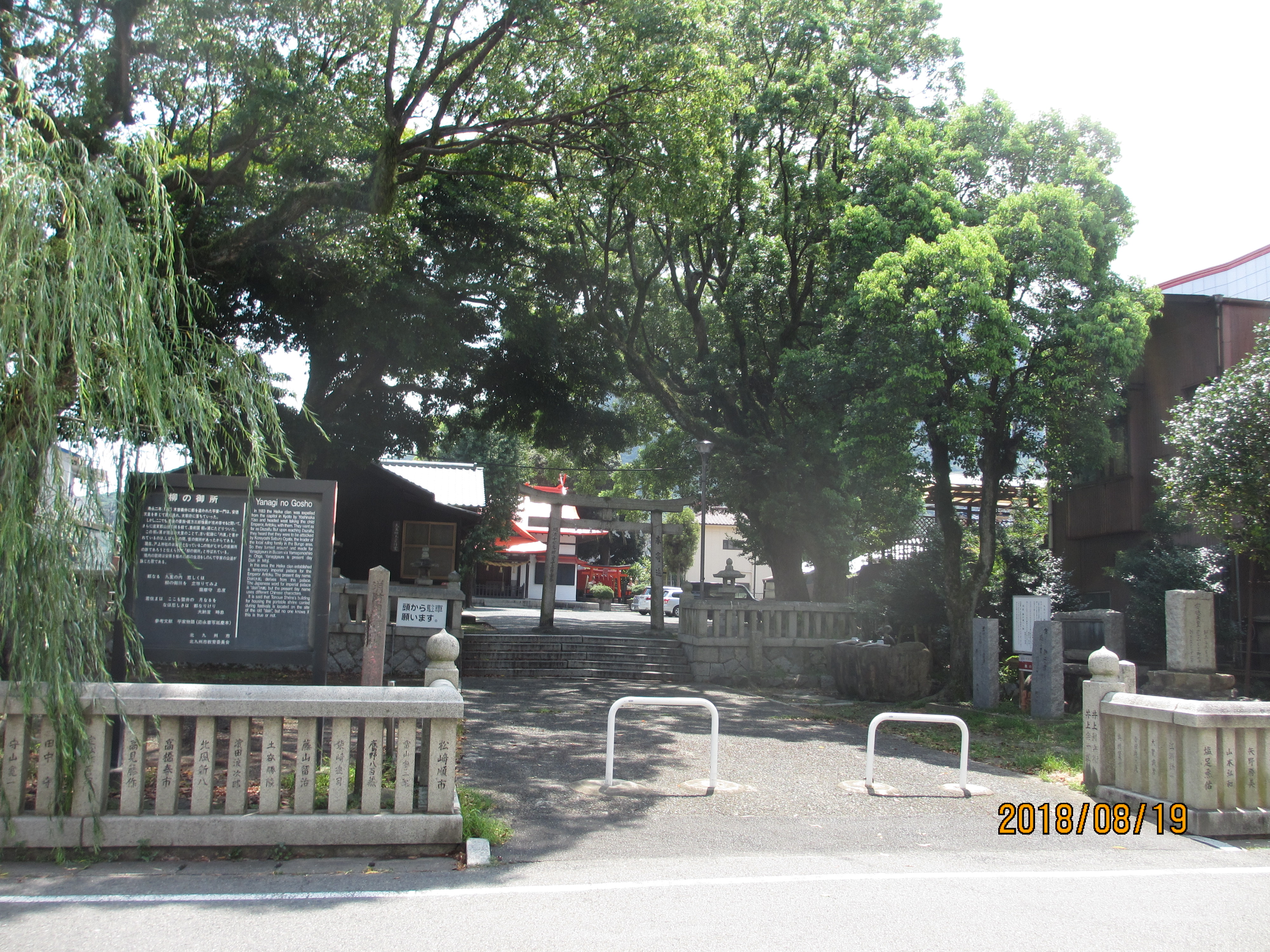 北九州市門司区大里戸ノ上1‐11JR門司駅南口傍